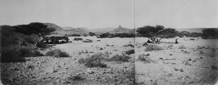 Foto is gemaakt tijdens een reis van Georges Révoil door Somalië